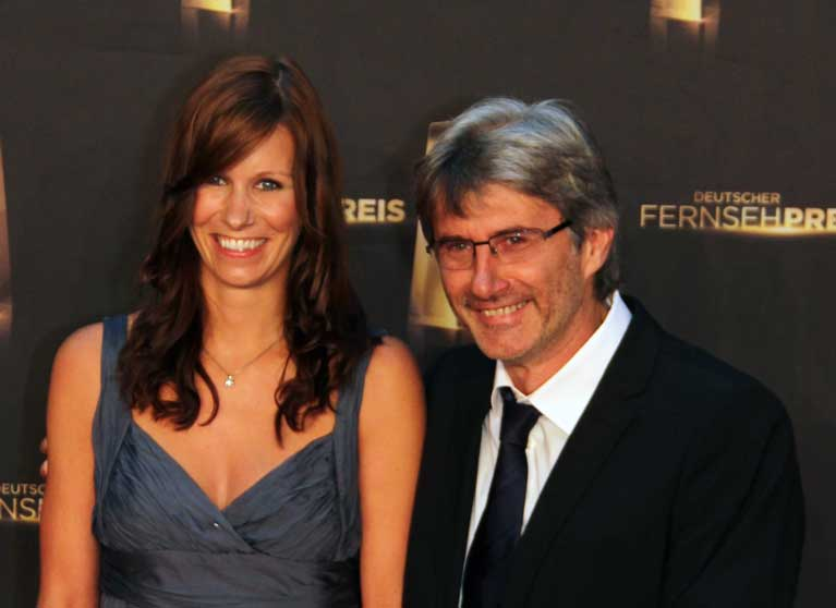 Preisträger Hermann Joha mit Begleitung beim Deutschen Fernsehpreis 2012